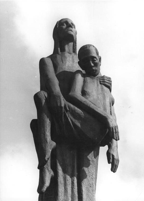 Mahn- und Gedenkstätte Ravensbrück, Plastik Zentralbild Junge 15.4.65 DDR: Zum 20. Jahrestag der Befreiung des Konzentrationslagers Ravensbrück. An der Nationalen Mahn- und Gedenkstätte Ravensbrück gedenken die Bürger der DDR und viele ausländische Gäste am 30. April dieses Jahres der 92.000 Frauen, Mütter und Kinder, die an dieser Stätte einen qualvollen Tod fanden. Hier verneigen wir uns vor den unsterblichen Helden des antifaschistischen Kampfes aus mehr als 20 Nationen, die für eine glückliche Zukunft aller Völker ihr Leben gaben. 132.000 Frauen und Kinder verschleppten die Hitlerfaschisten nach Ravensbrück, 92.000 erlebten den Tag der Befreiung nicht mehr. UBz: Plastik des Mahnmals von Nationalpreisträger Professor Fritz Cremer. [Mahn- und Gedenkstätte für das Konzentrationslager Ravensbrück, Skulptur "Tragende" von Will Lammert]